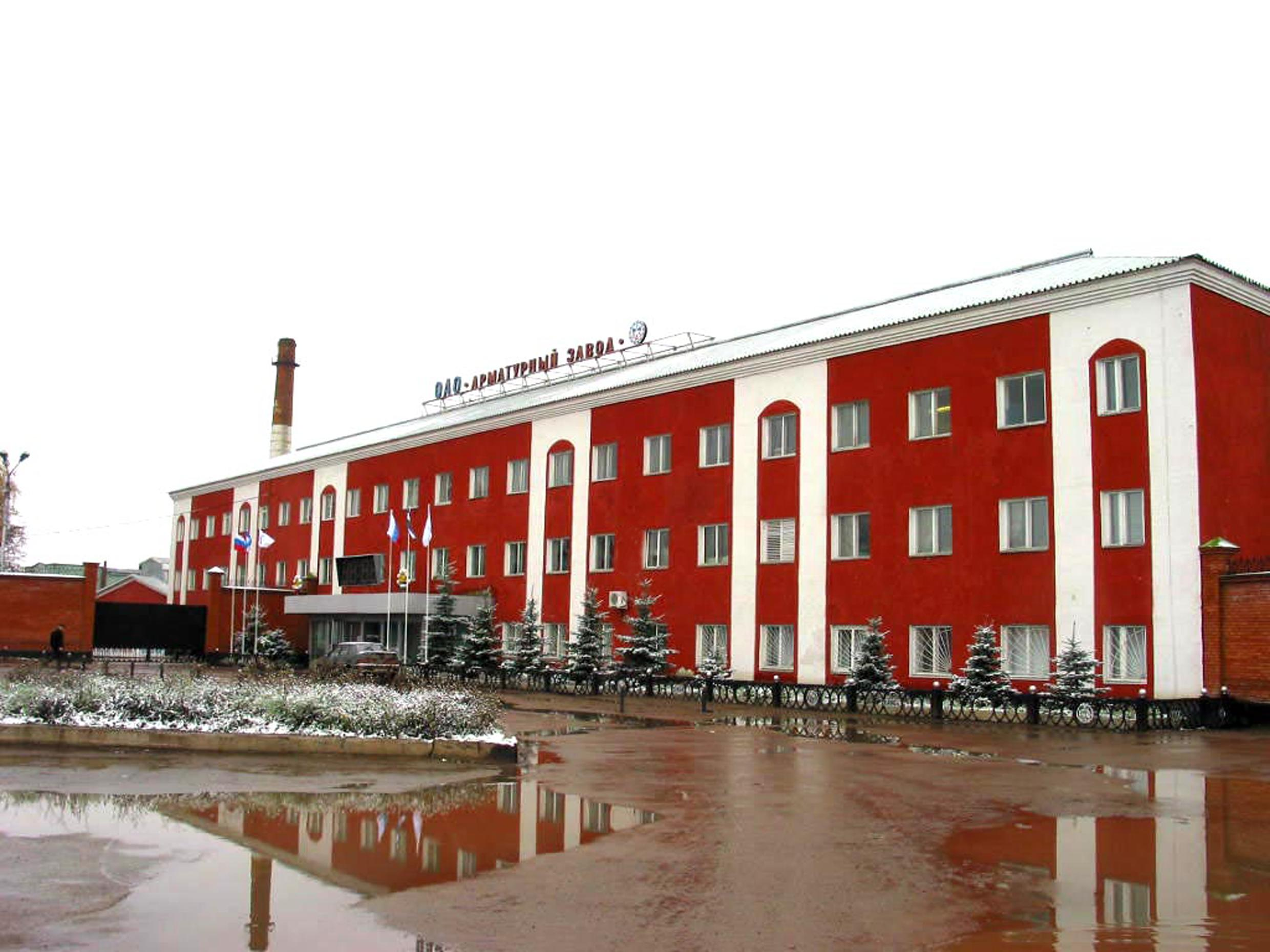 История города Благовещенска связана с основанием и строительством в 1756 году медеплавильной фабрики. В этом же году в день христианского праздника Благовещения была заложена одноимённая церковь, что и определило впоследствии название посёлка, позднее ставшего городом Благовещенском.